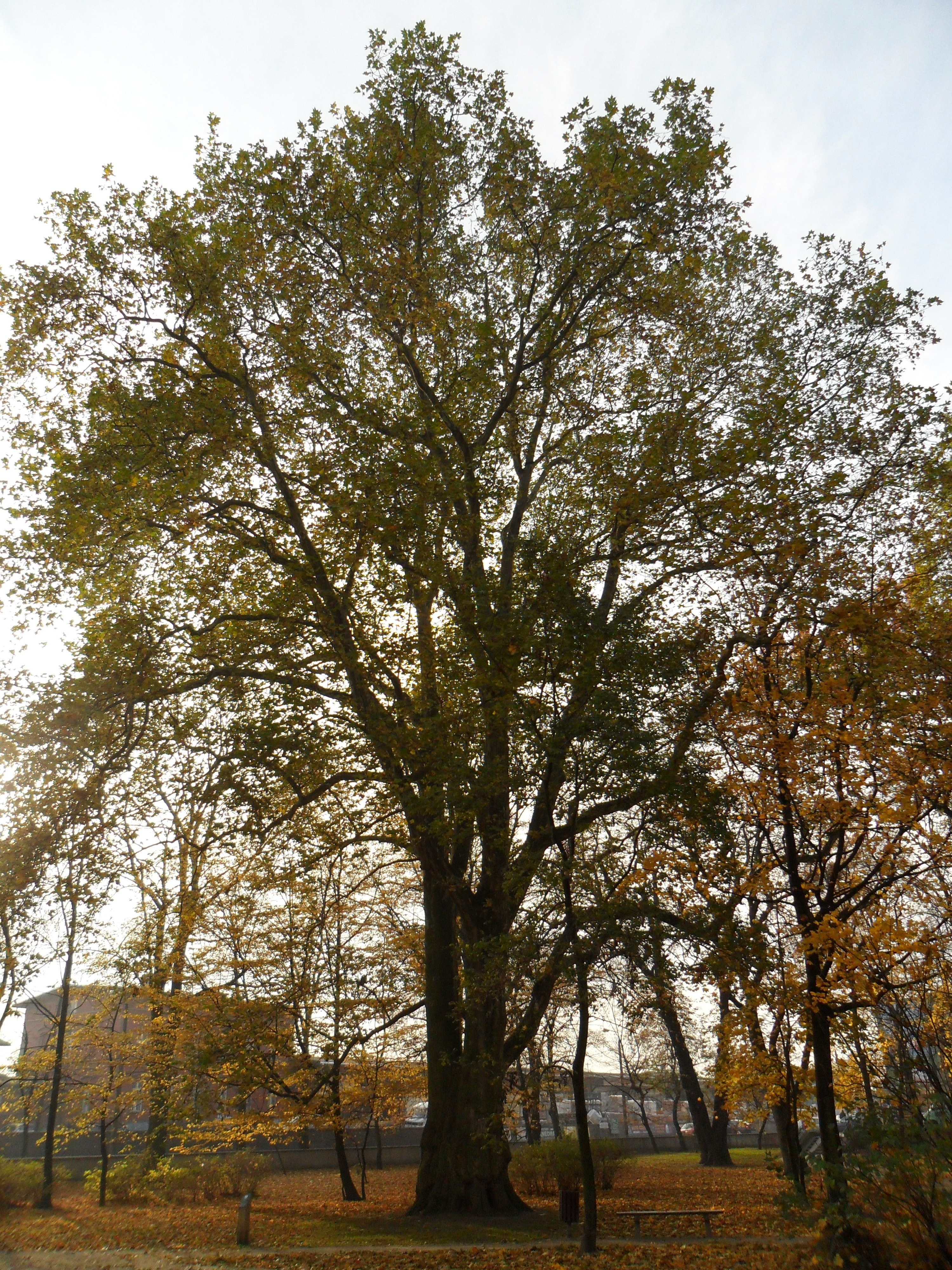 Platan klonolistny w środkowej części parku Kolejowego w Raciborzu. Ustanowiony pomnikiem przyrody.